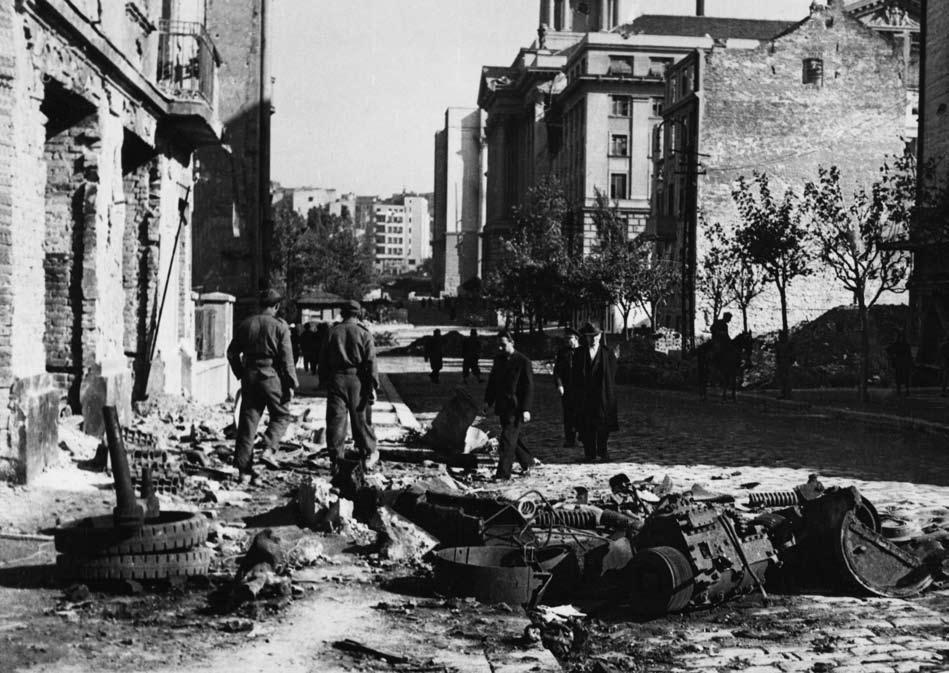 Srpskohrvatski / српскохрватски: Sarajevska ulica, 12.oktobar 1944.